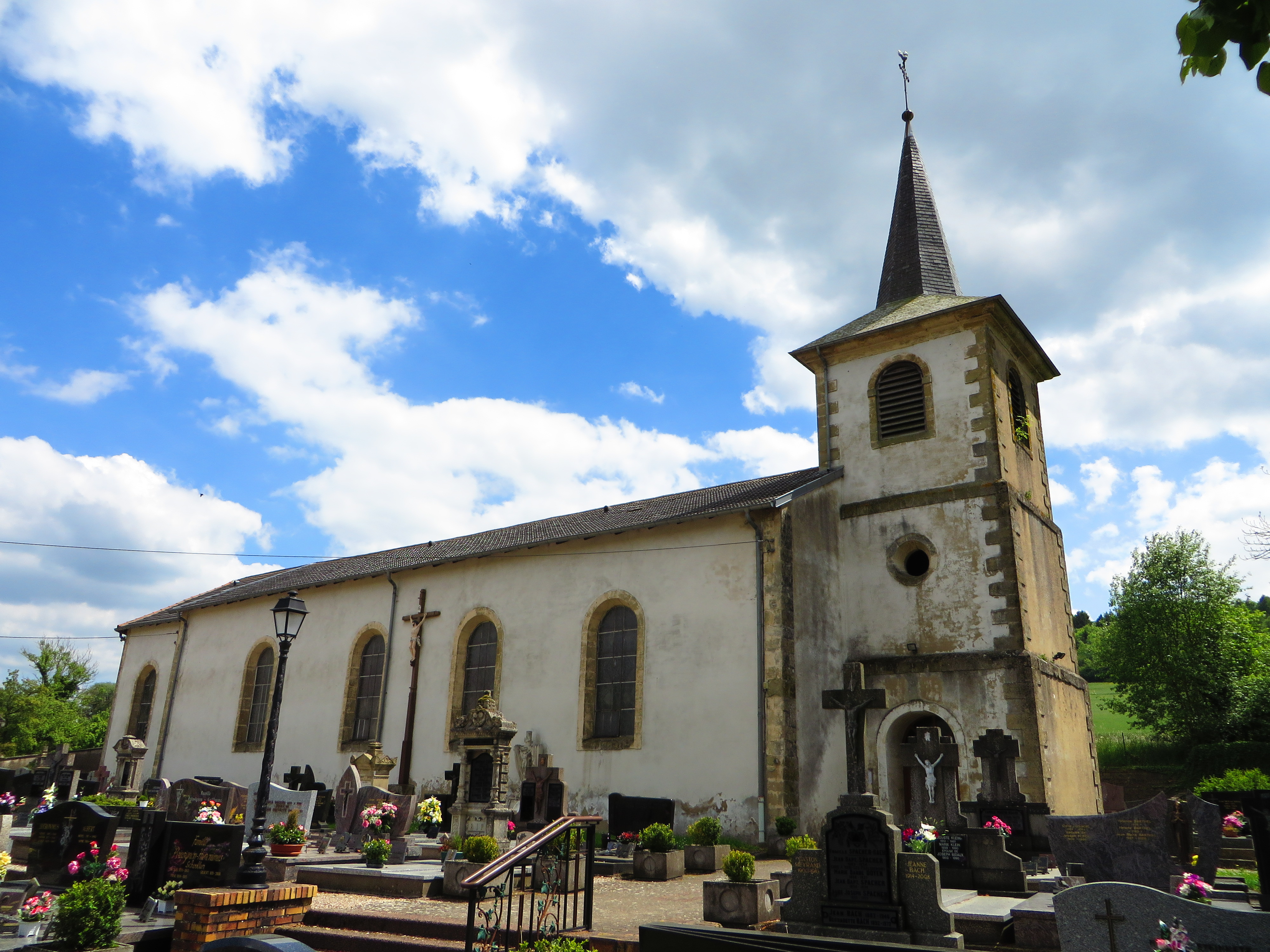 Haute Vigneulles eglise